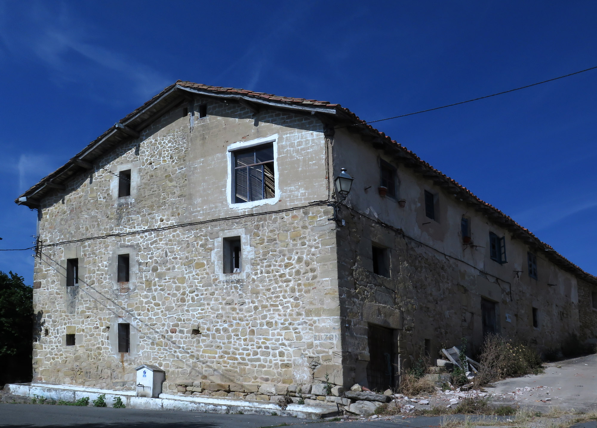 Caserío en estado de ruina en Villambrosa (Álava, España)